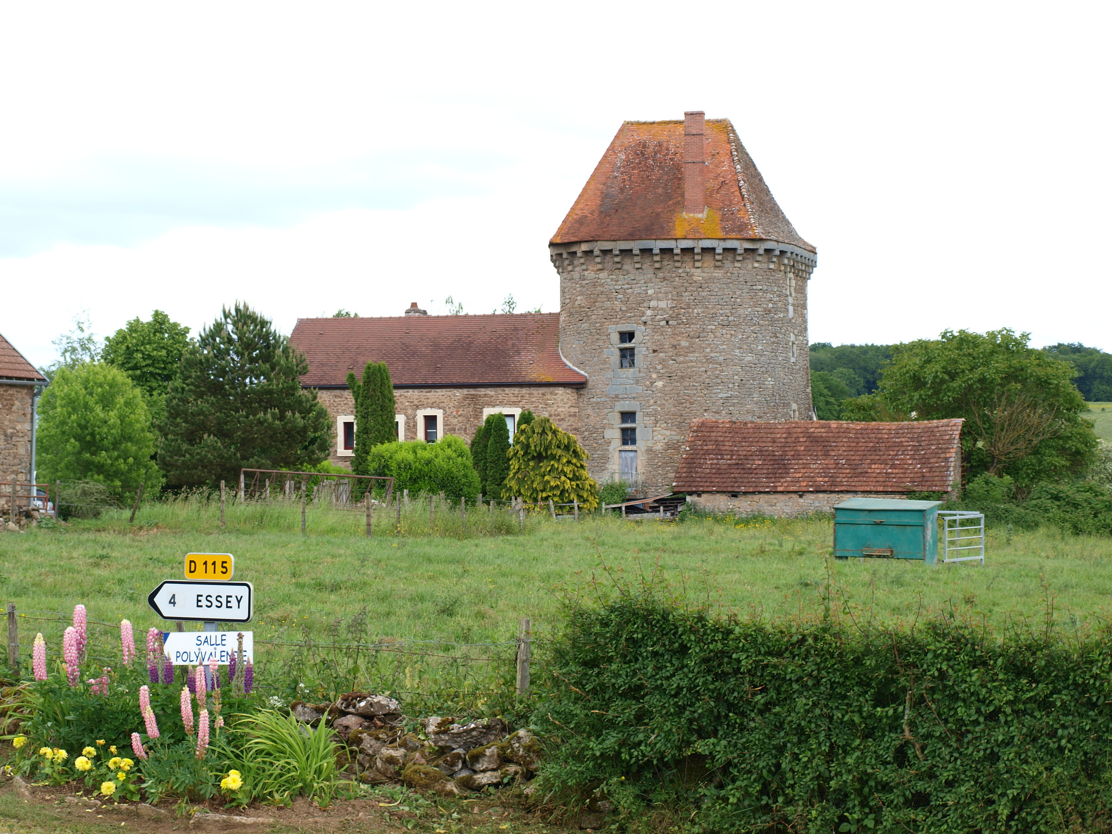 Clomot (Côte d'Or, France)